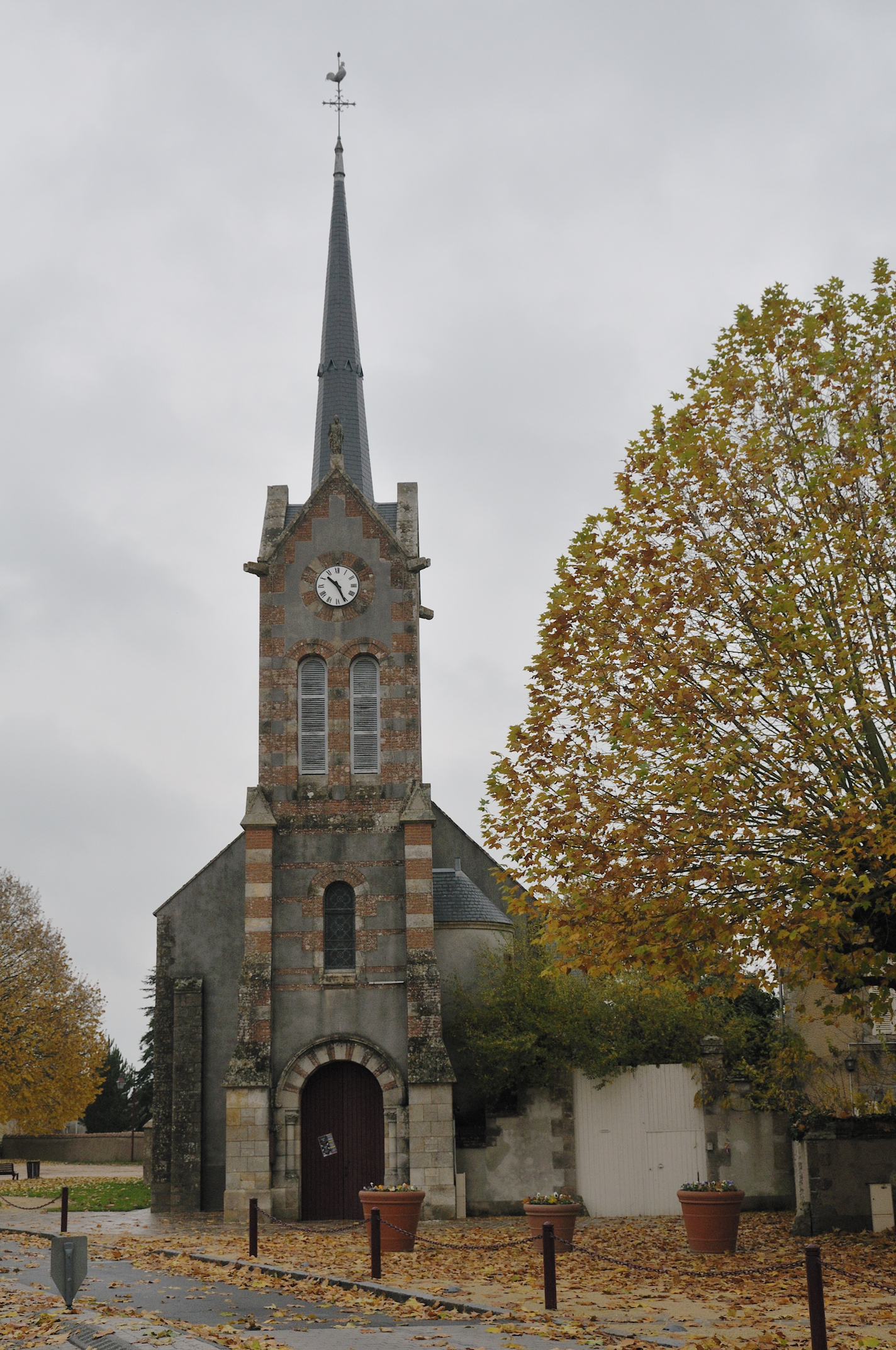 Église Saint-Sulpice, Sully-la-Chapelle, Loiret, France